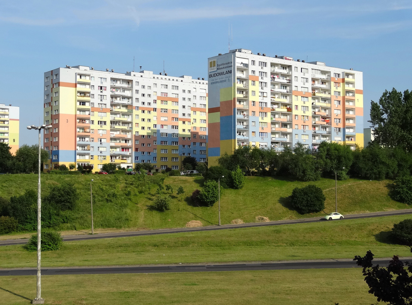 Osiedle Wyżyny w Bydgoszczy - widok ze Wzgórza Wolności